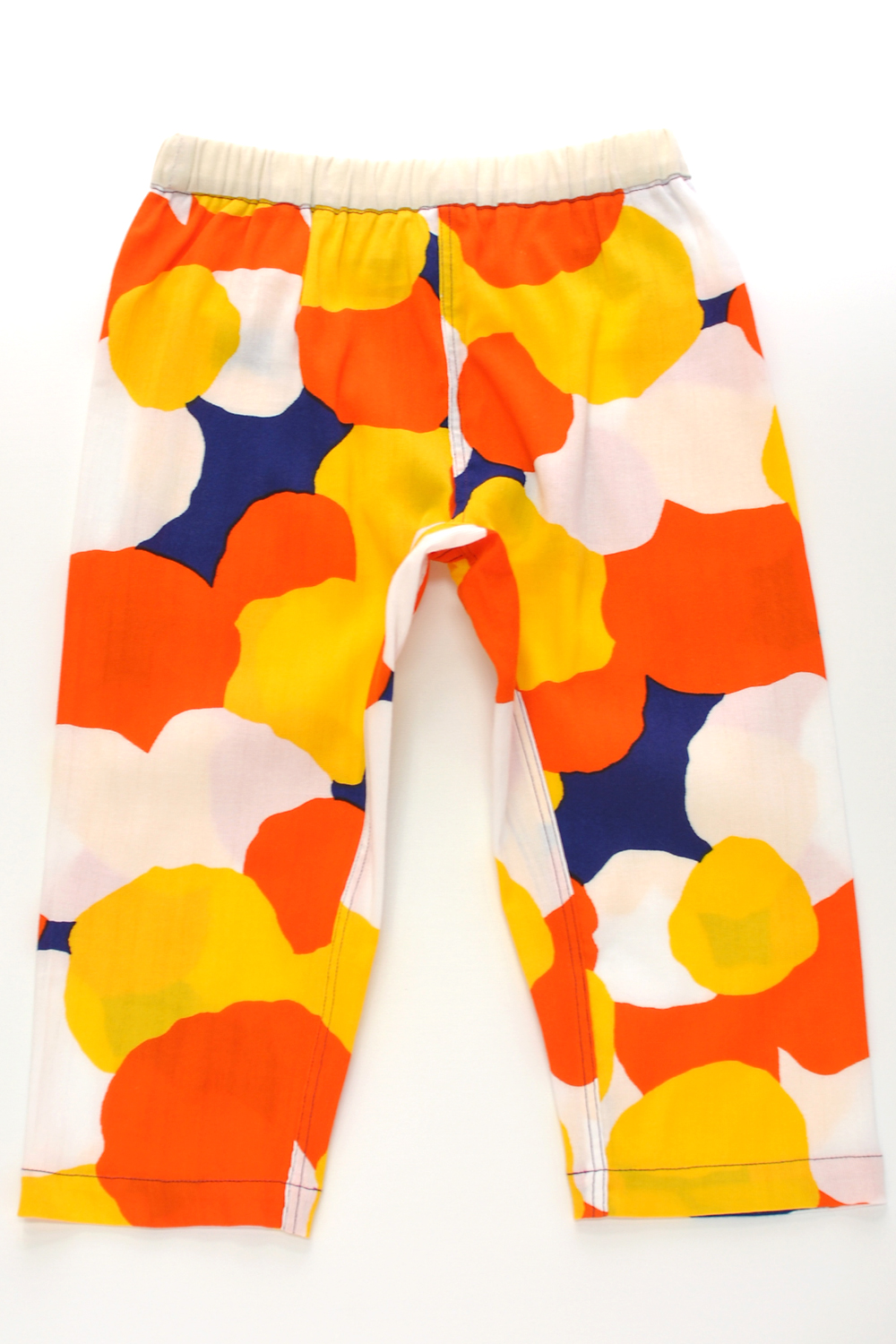 日本の蒸し暑い夏を過ごすには快適なステテコは、汗取りとしての用途だけでなく、お洒落着としても注目されている。